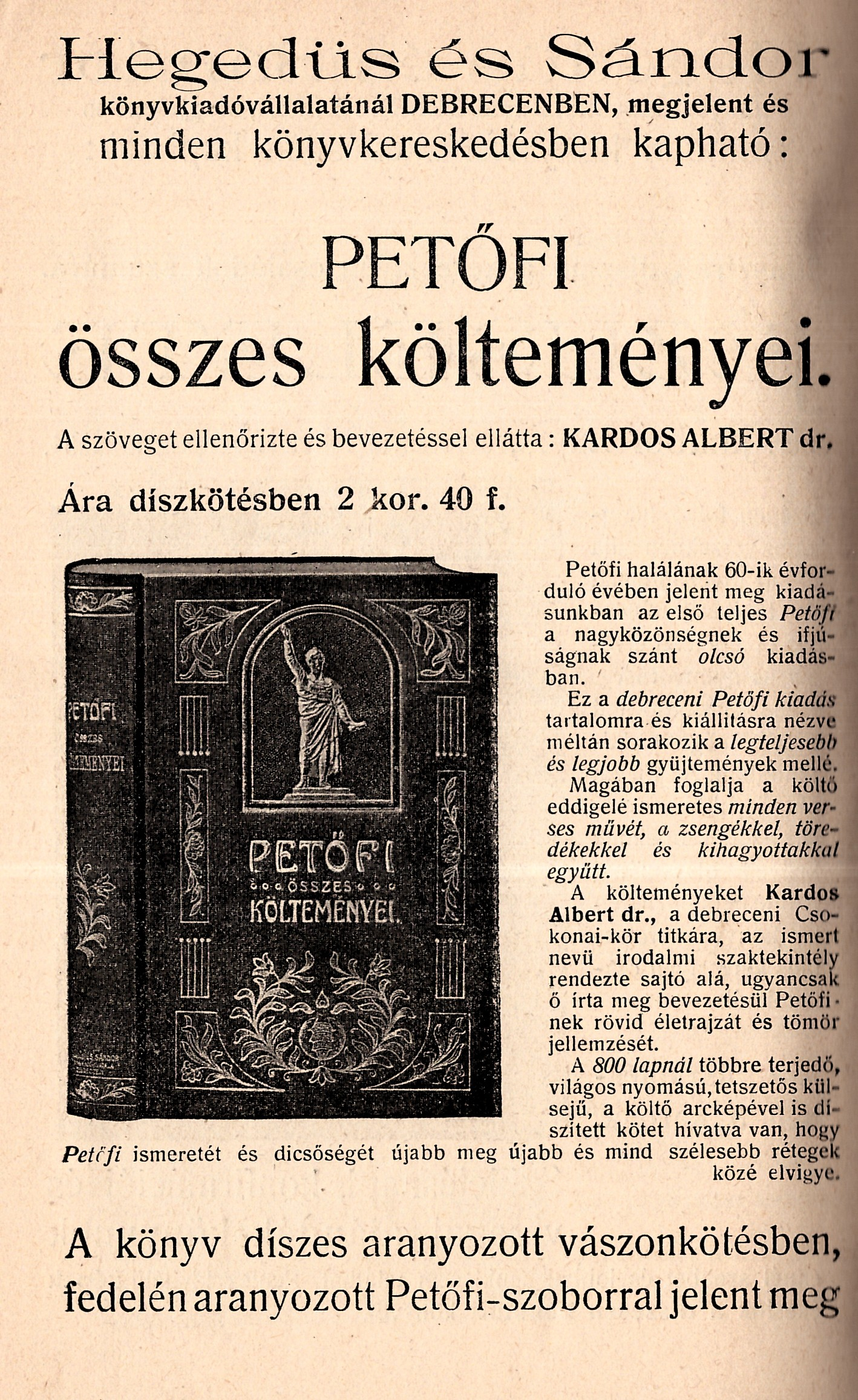 Petőfi Sándor összes költeményei Kardos Albert bevezetésével. Hirdetés IN: Murányi János: Bibliai szemelvények könyve